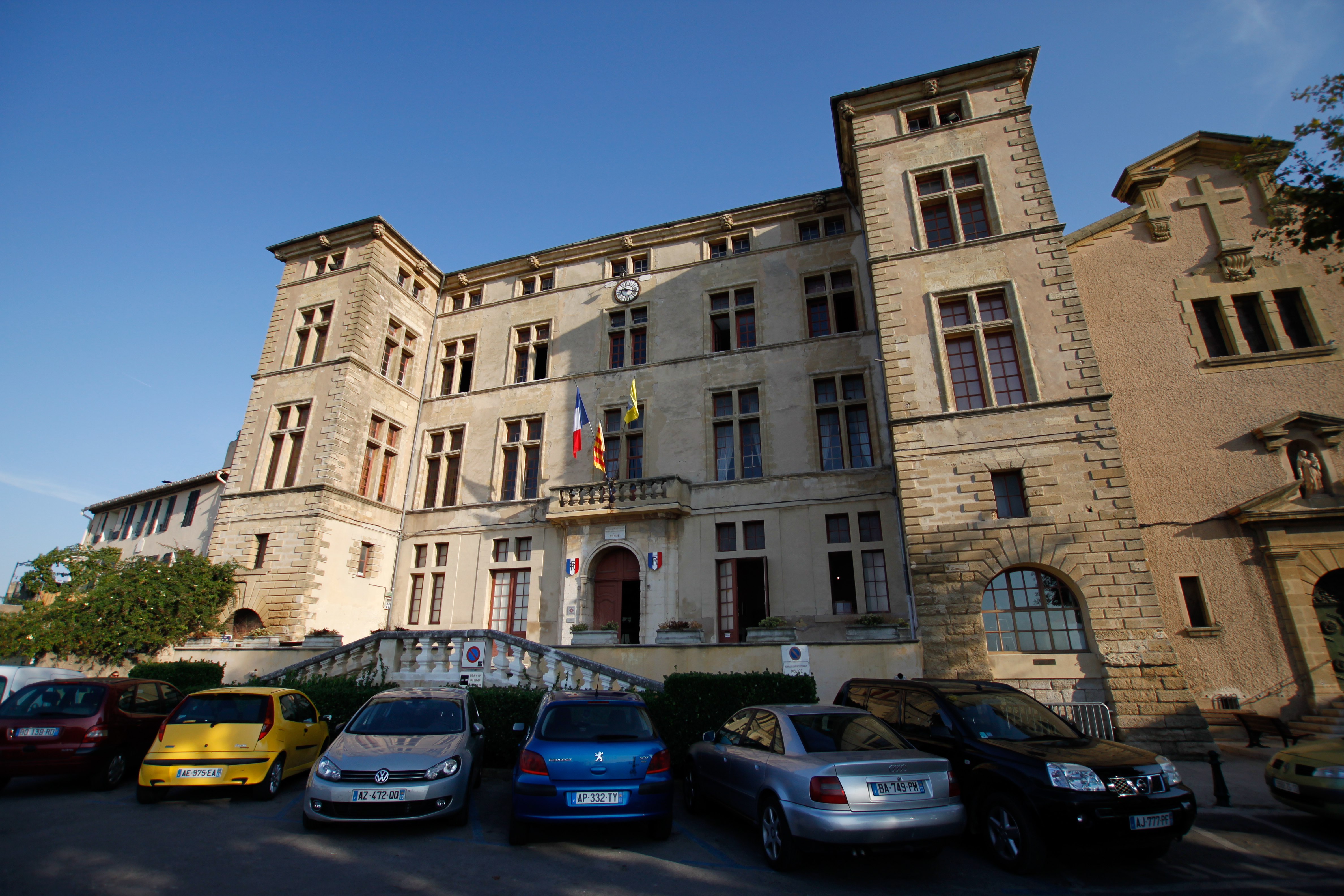 Actuellement Mairie de la ville d'Eguille le château a été édifié au XVIIe .